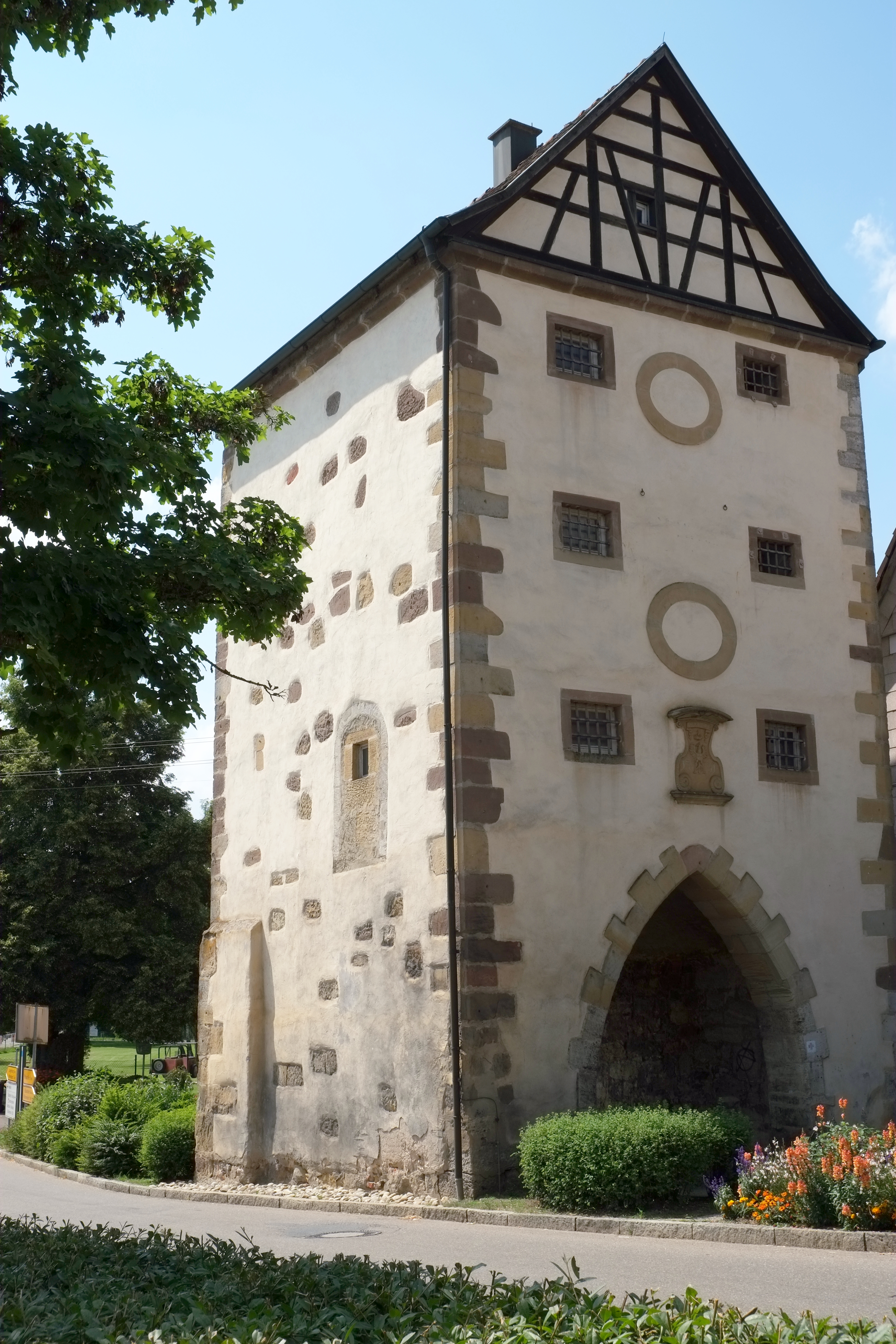 Stadttor in Gerabronn im Landkreis Schwäbisch Hall (Baden-Württemberg, Deutschland)